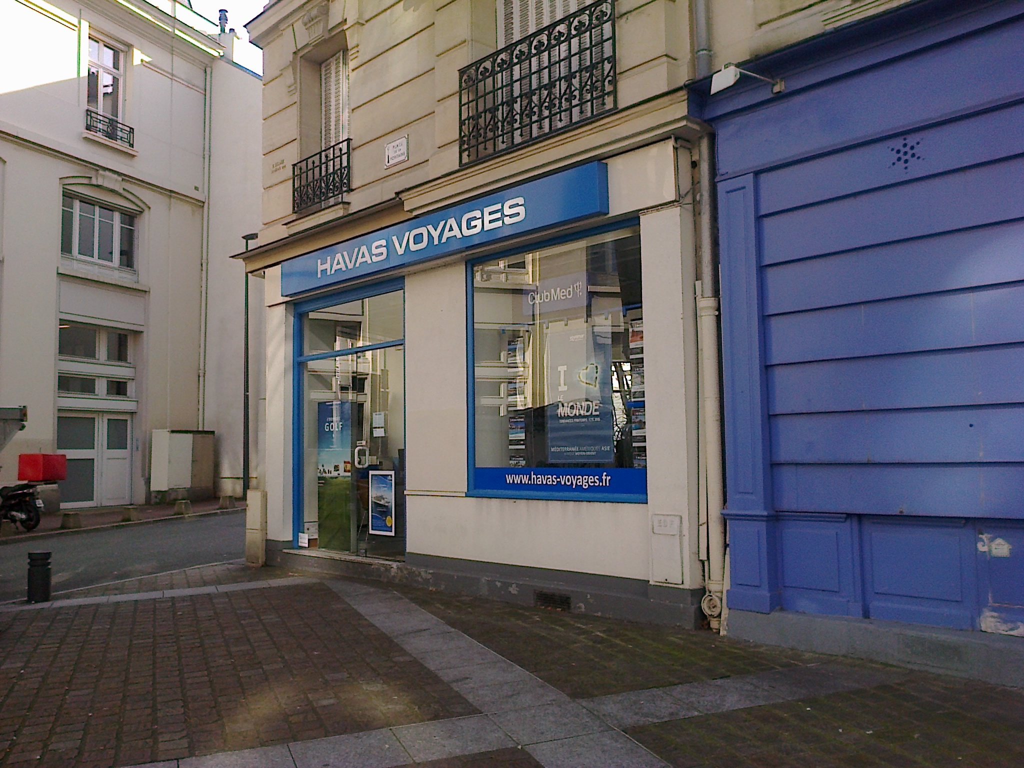 Agence Havas Voyages d'Issy-les-Moulineaux (Hauts-de-Seine, France).